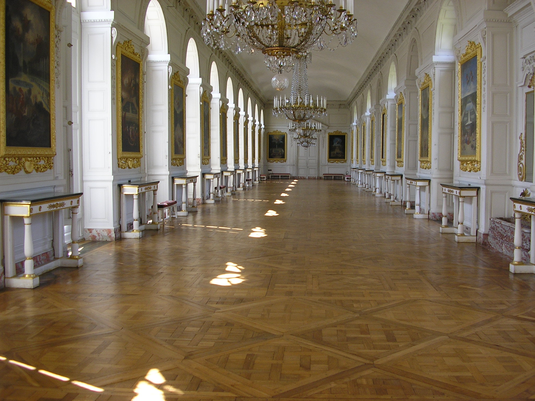 La sala de baile del Gran Trianon, en las paredes cuelgan cuadros de pintores italianos.